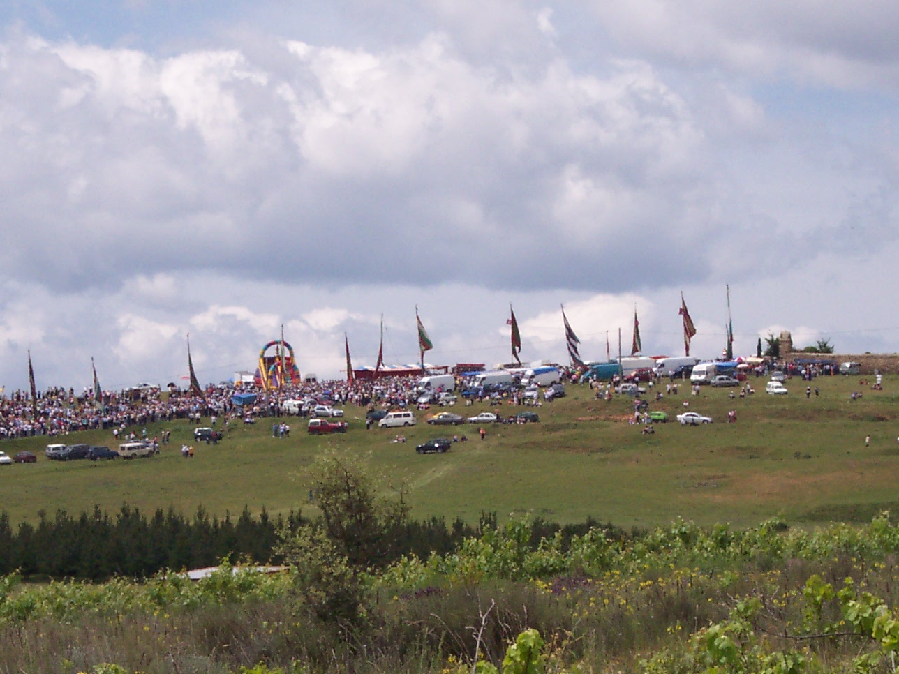 Llegada de la procesión procedente de Astorga al Santuario de Castrotierra.